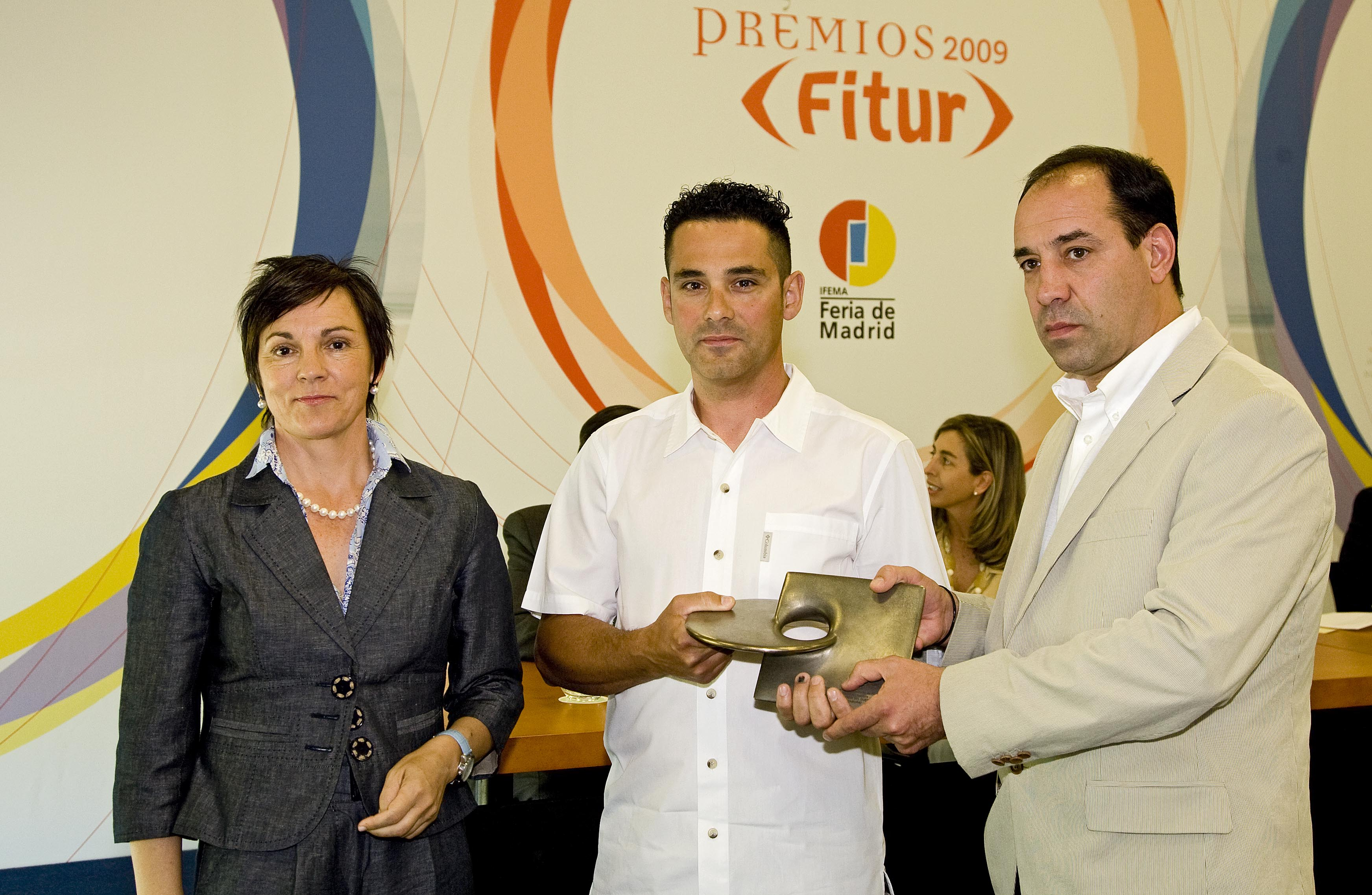 Entrega del Pemio Fitur 2009 al Mejor producto de turismo activo en Aventura por parte de la directora de Fitur, Ana Larrañaga